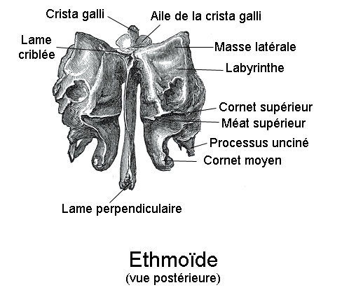 Ethmoïde. Vue postérieure. Anatomie humaine